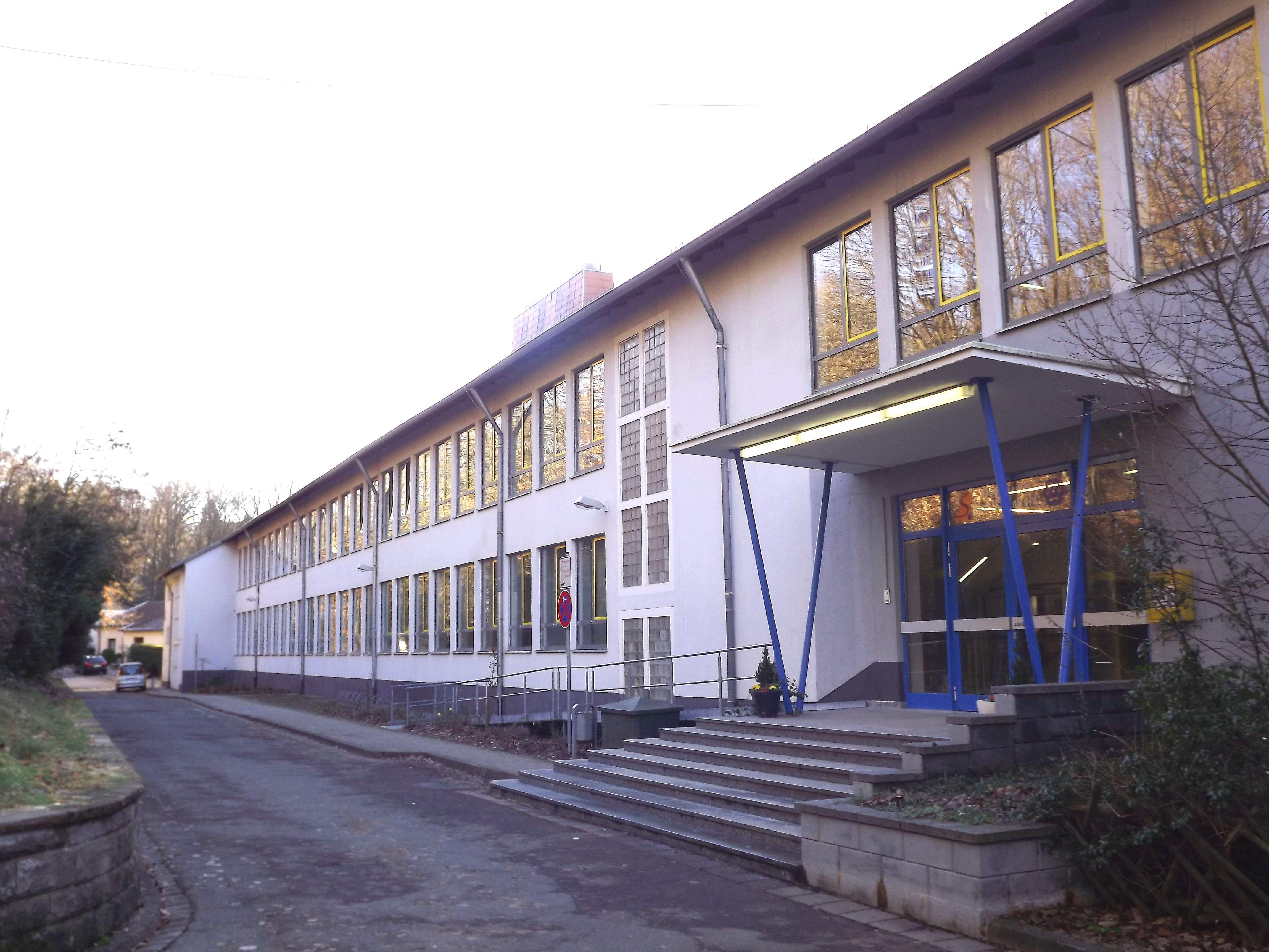 Hauptgebäude des Gymnasium am Steinwald (GaS) in Neunkirchen/Saar am 16.01.2012.